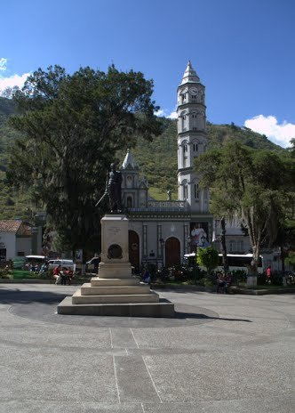 La Plaza Bolívar de Timotes y Basílica Menor Santa Lucia año